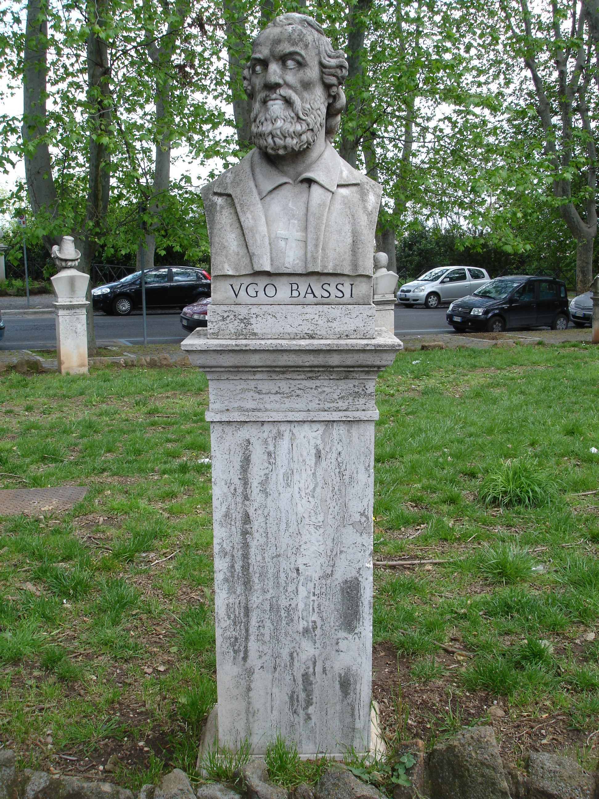 Busto di Ugo Bassi (Cento, 12 agosto 1801 – Bologna, 8 agosto 1849) sul Gianicolo, a Roma. Foto scattata da F. Fullone. Original uploader was Fullo88 at it.wikipedia.